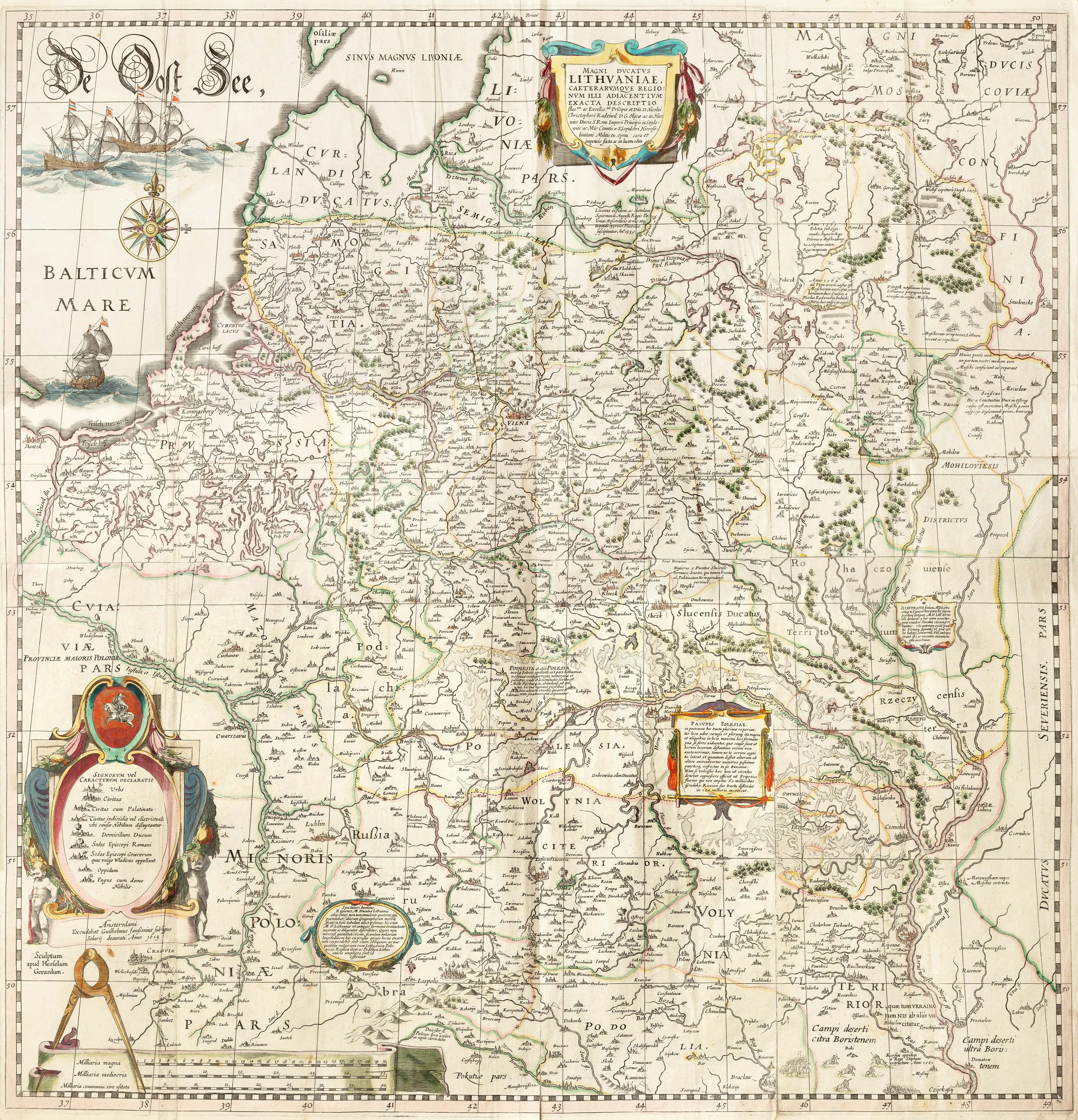 Magni Ducatus Lithuaniae Caeterarumque Regionum Illi Adjacentium Anno 1613, Hessel Gerittzs/Willem Blaeu (Amsterdam, 1613, 1640) Карта Радзивіла – перше картографічне джерело, де використана назва «Україна». Перше видання карти було здійснене Віллемом Блау у 1613 р. Мапа залишалася основним джерелом географічних знань про регіон наступні 150 років. Карта містить величезну кількість назв міст, сіл, річок, озер, територій України.